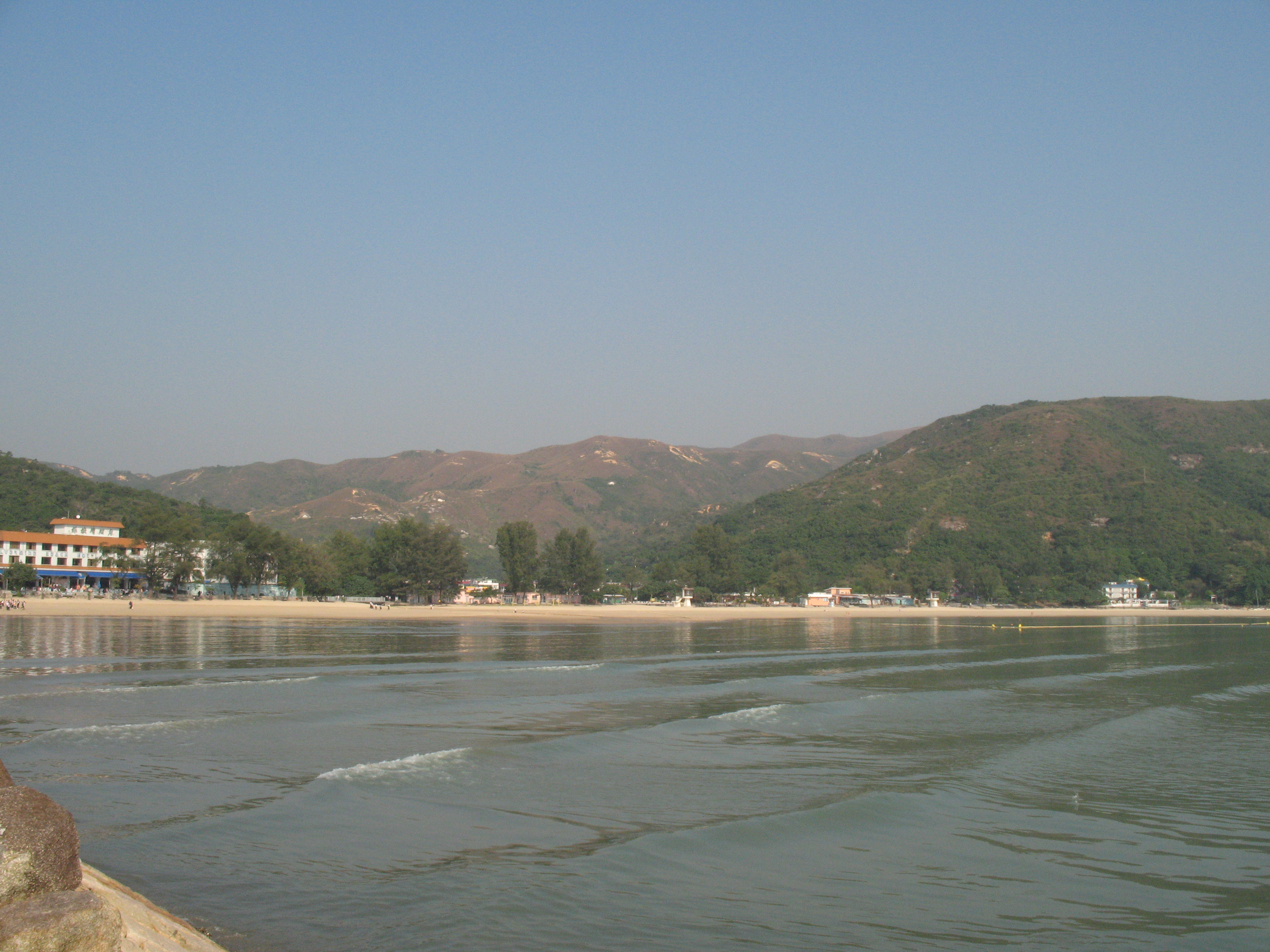 Silver Mine Bay